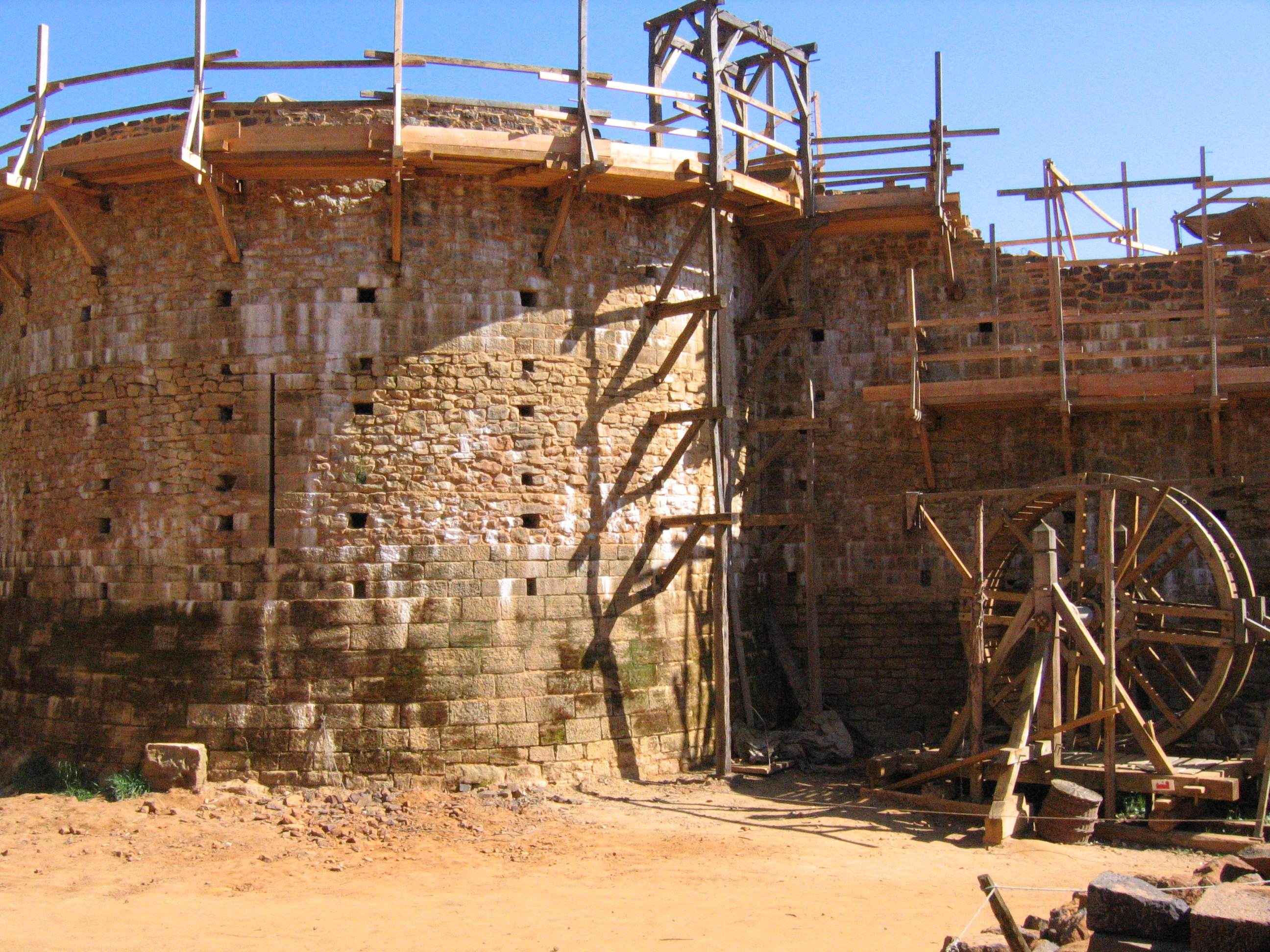 guedelon tour maitresse avril 2007